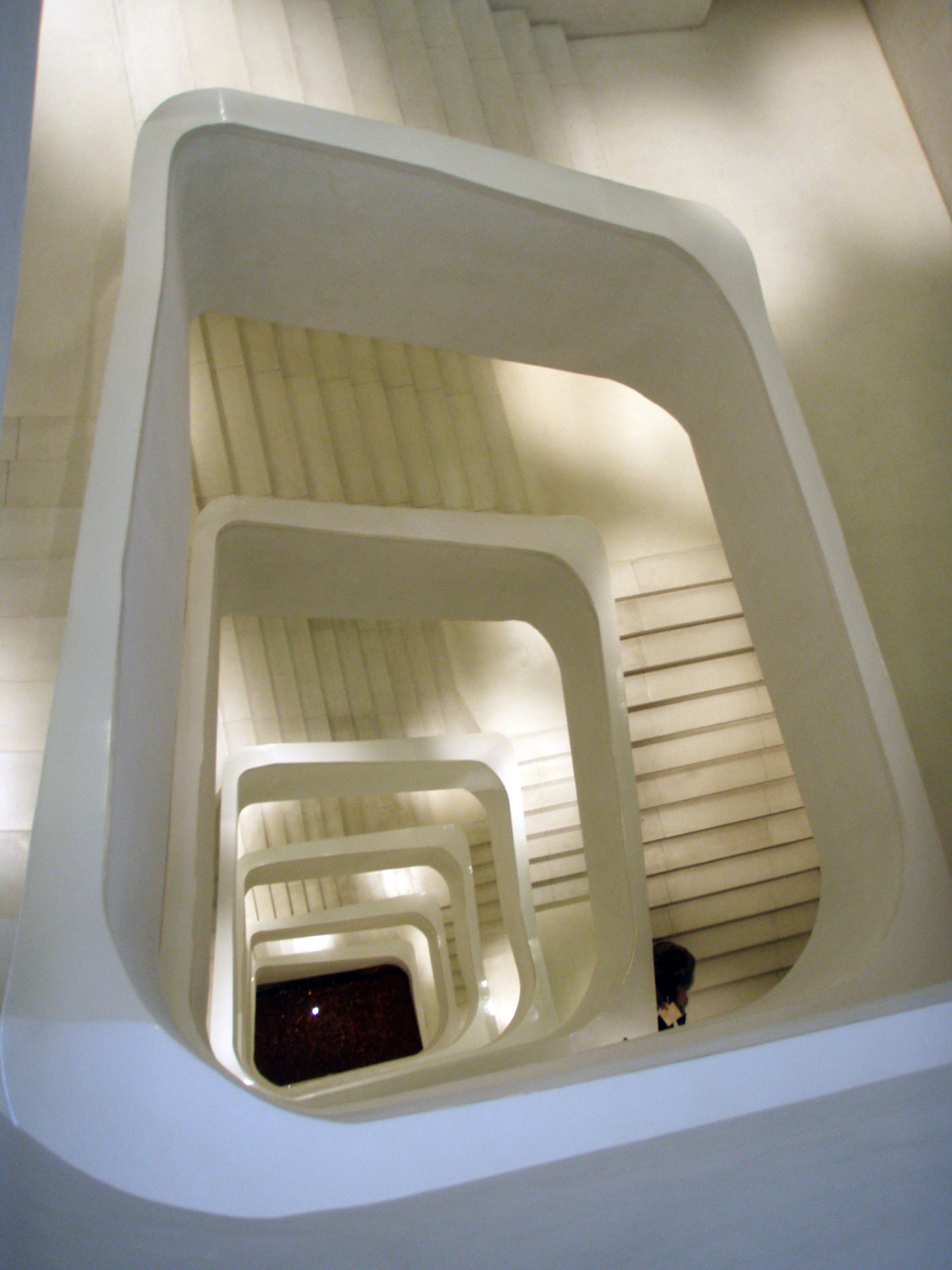 CaixaForum, Madrid, stairwell.